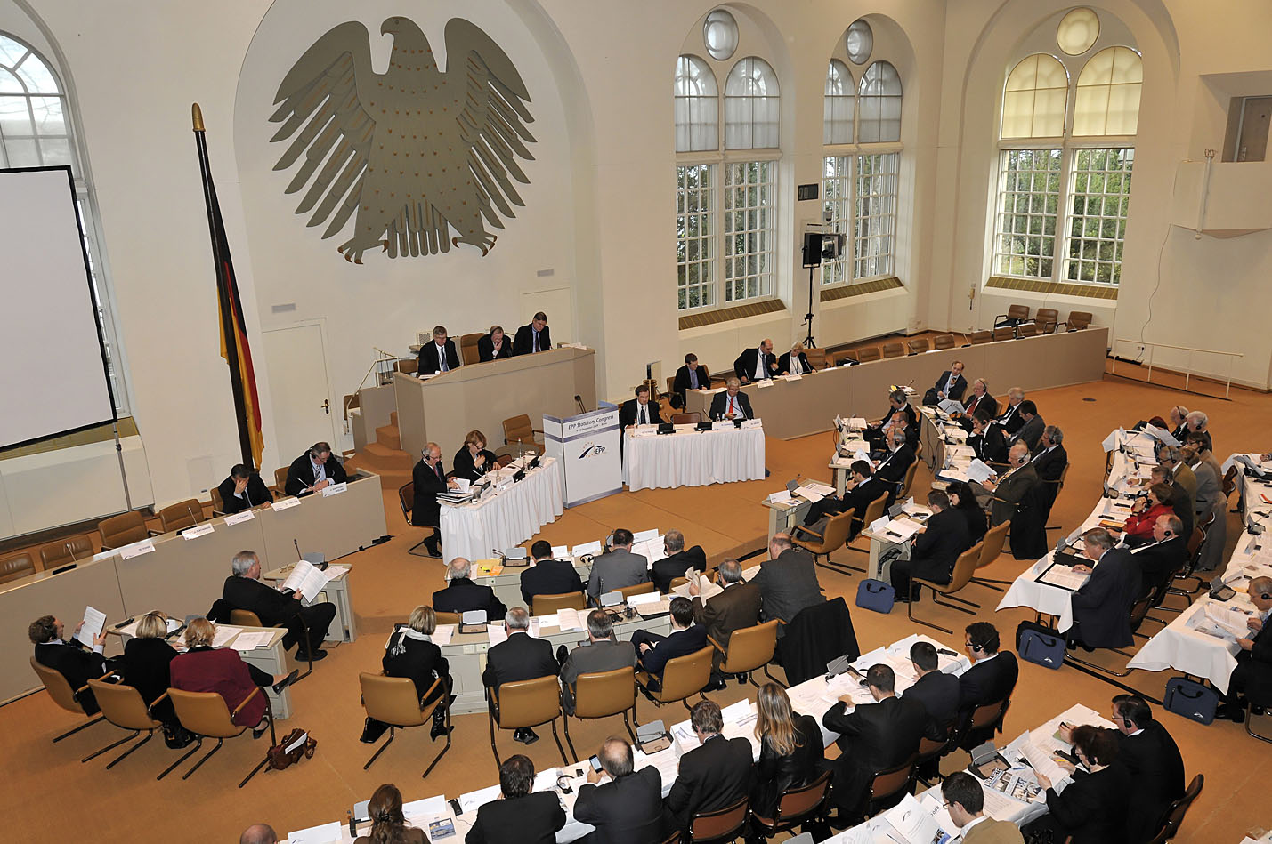 09_Bonn_0006